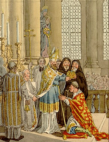 Coronation of Przemysł II in Gniezno 1295